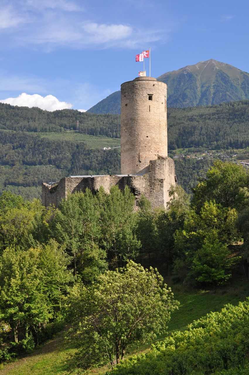 Château de la Bâtiaz, Martigny, Valais, Suisse.